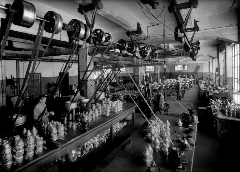 Alkuperäinen kuvaus: Kone- ja Siltarakennus Oy, separaattoritehdas, separaattorien kokoonpano-- ja koetusosasto.